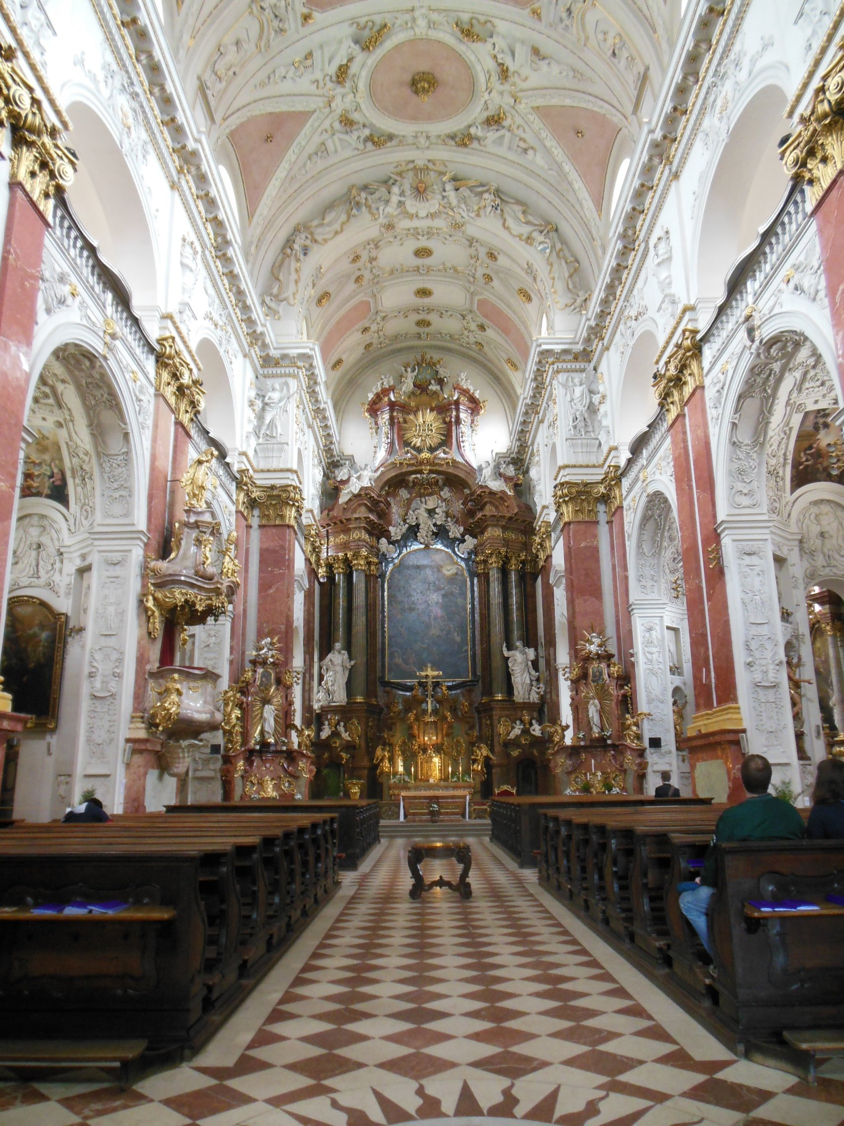 Celkový pohled do interiéru kostela svatého Ignáce z Loyoly na Karlově náměstí na Novém Městě v Praze.